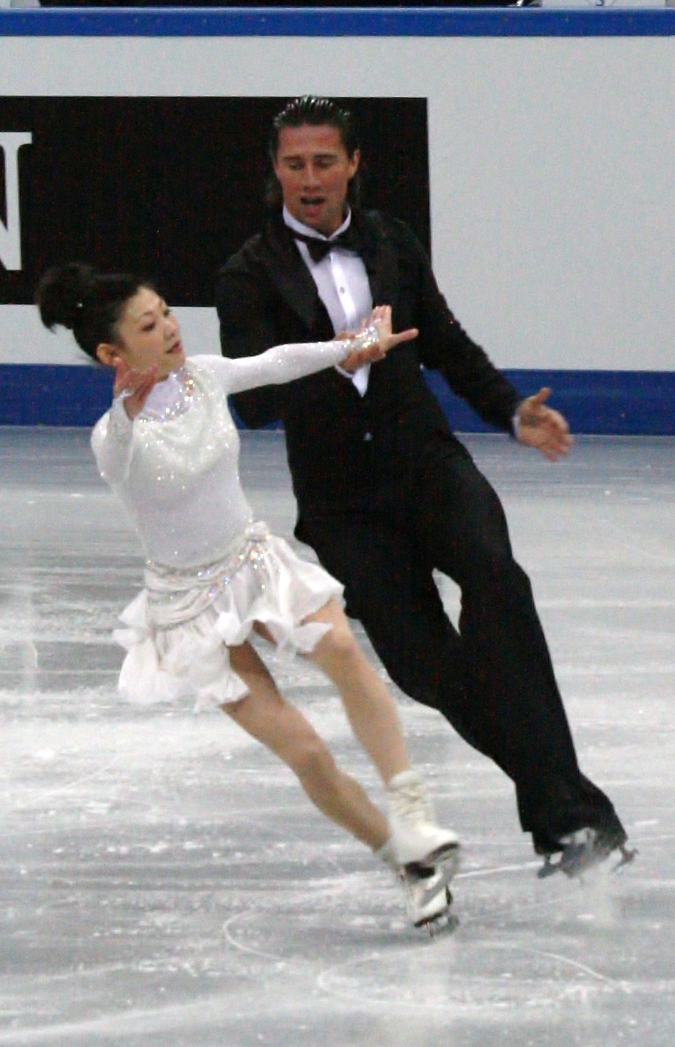 Юко Кавагути и Александр Смирнов (Россия) на финале Гран-при 2012-2013. Короткая программа.